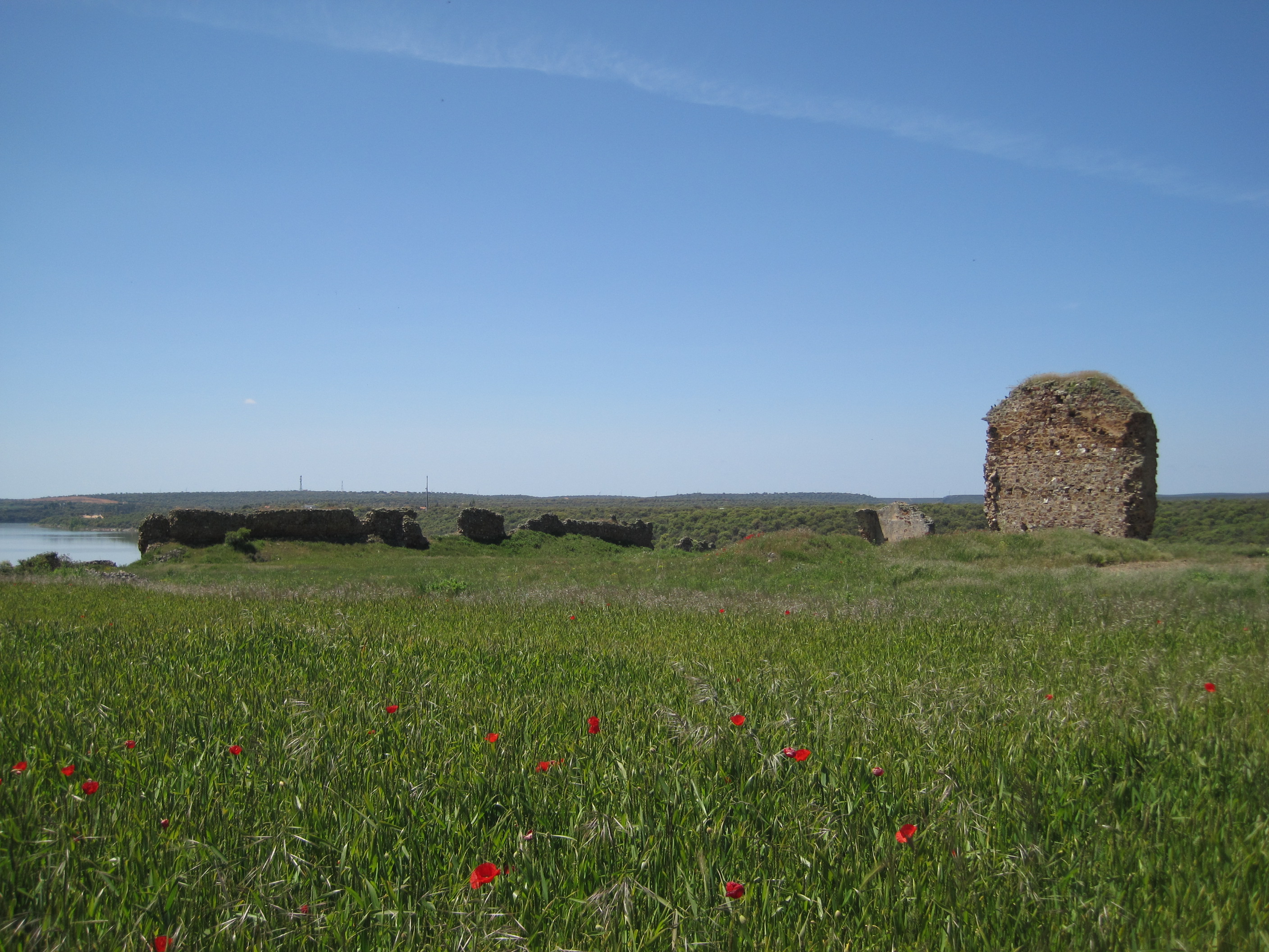 Diversas ruinas del despoblado de Castrotorafe (Zamora, España).